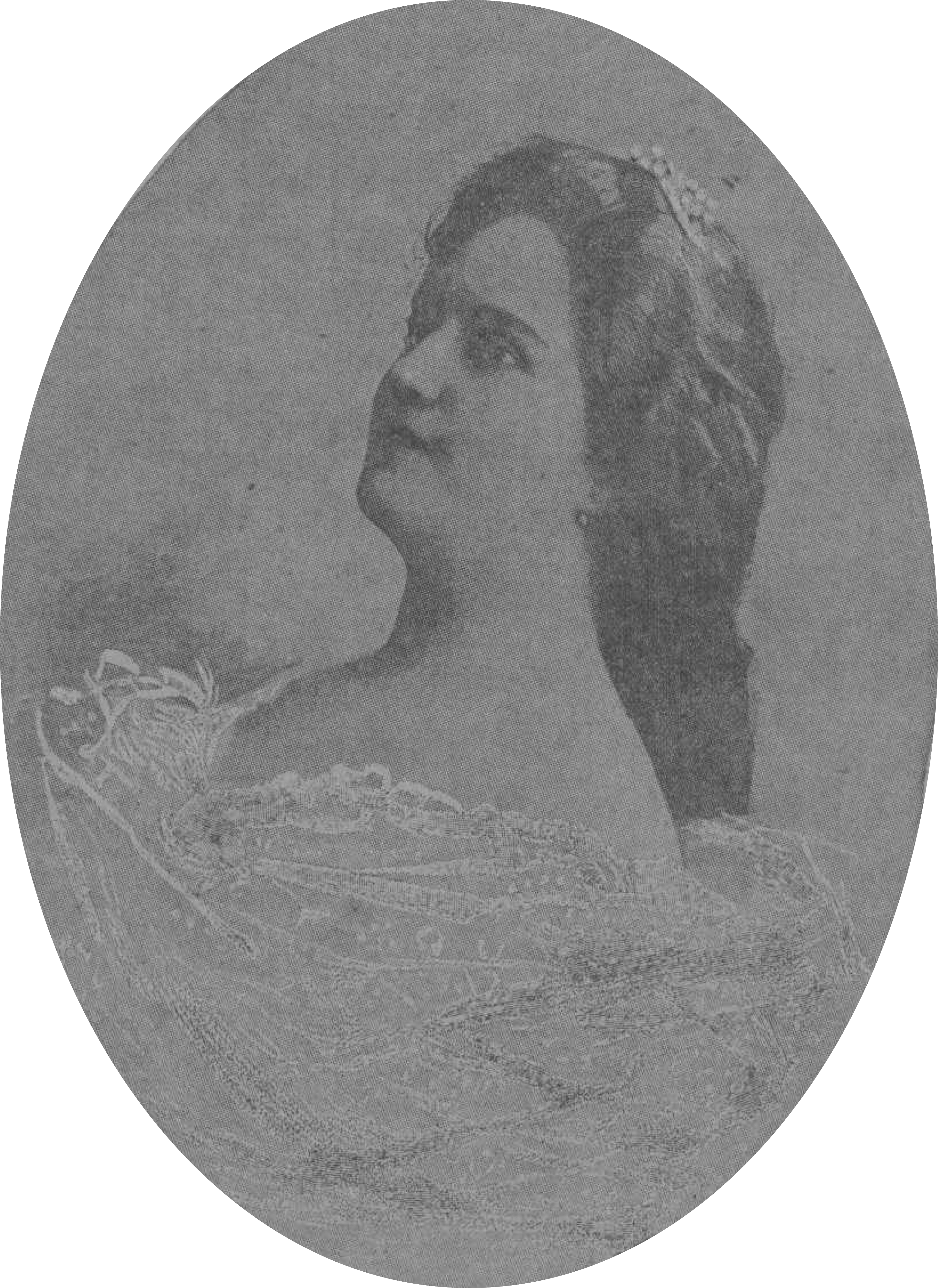 Fanny Fithian, countess (Arthur) de Gabriac